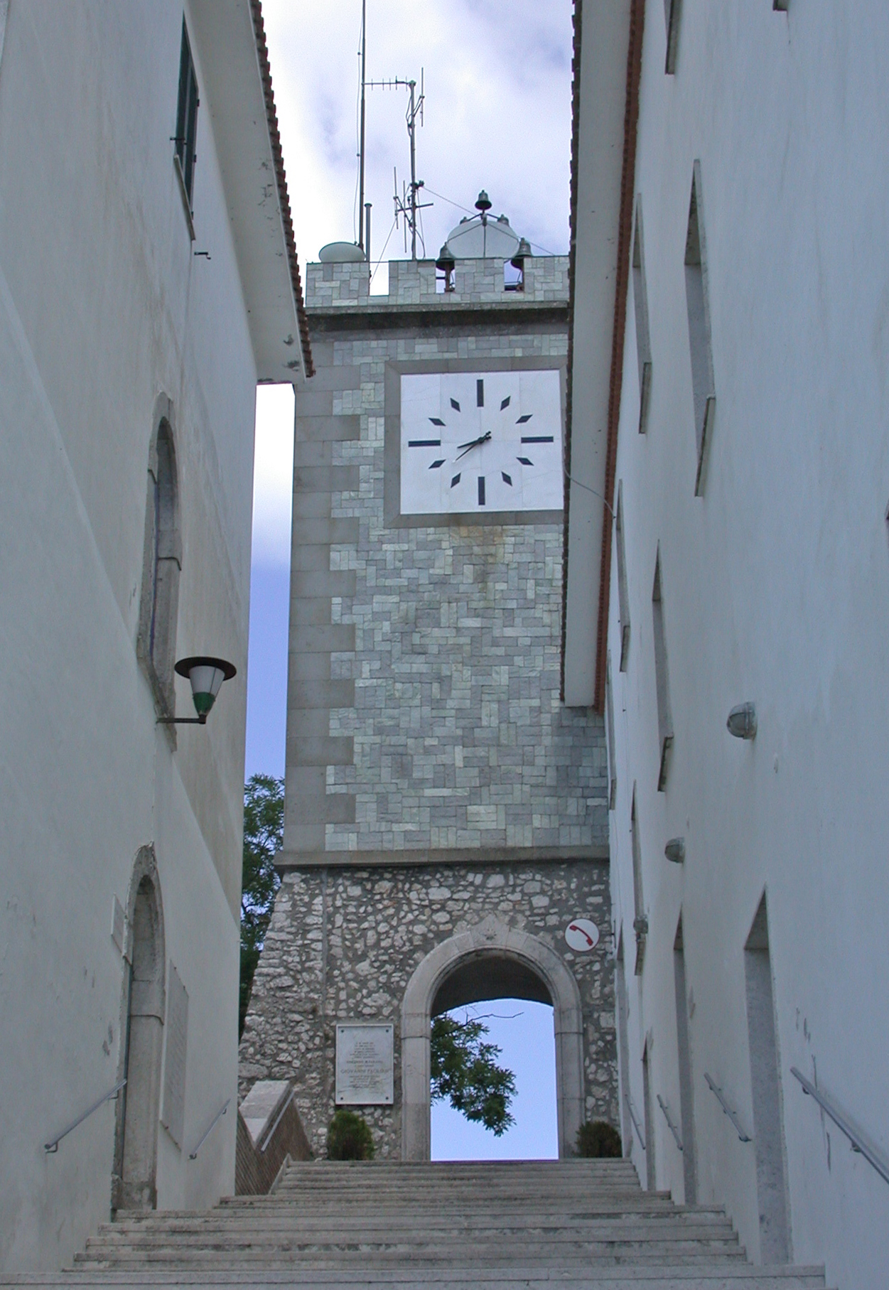 Itri, provincia di Latina, regione Lazio, Italia. Santuario della Madonna della Civita (monte Civita), ingresso alla chiesa.